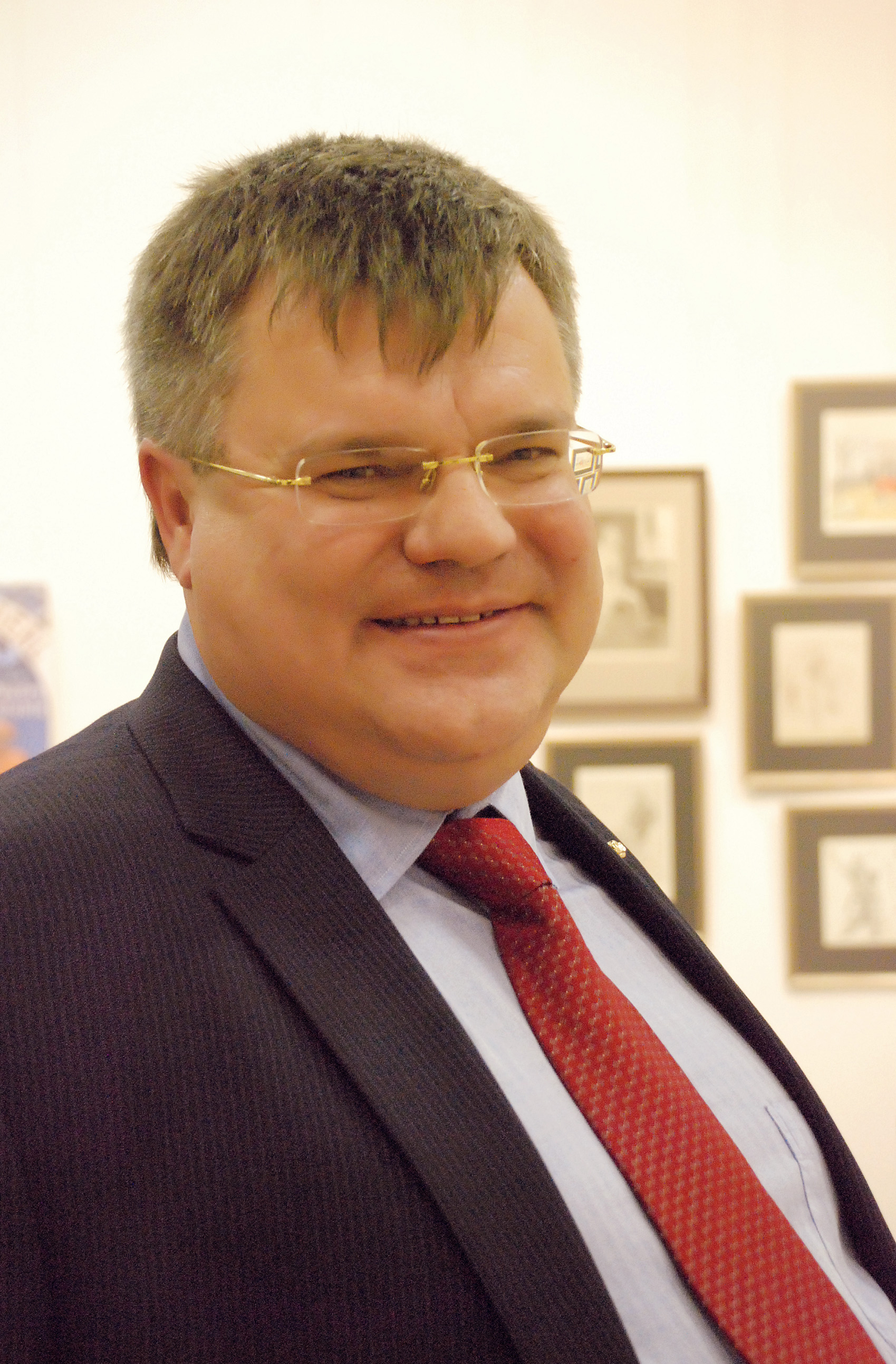 председатель правления Белгазпромбанка